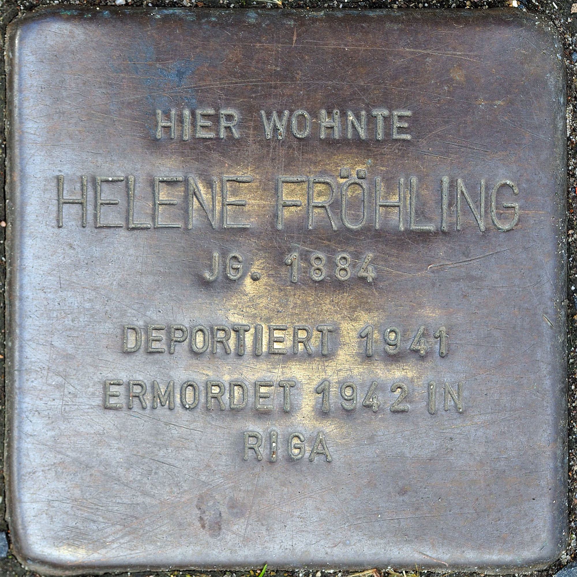 Stolpersteine MG: Fröhling, Helene